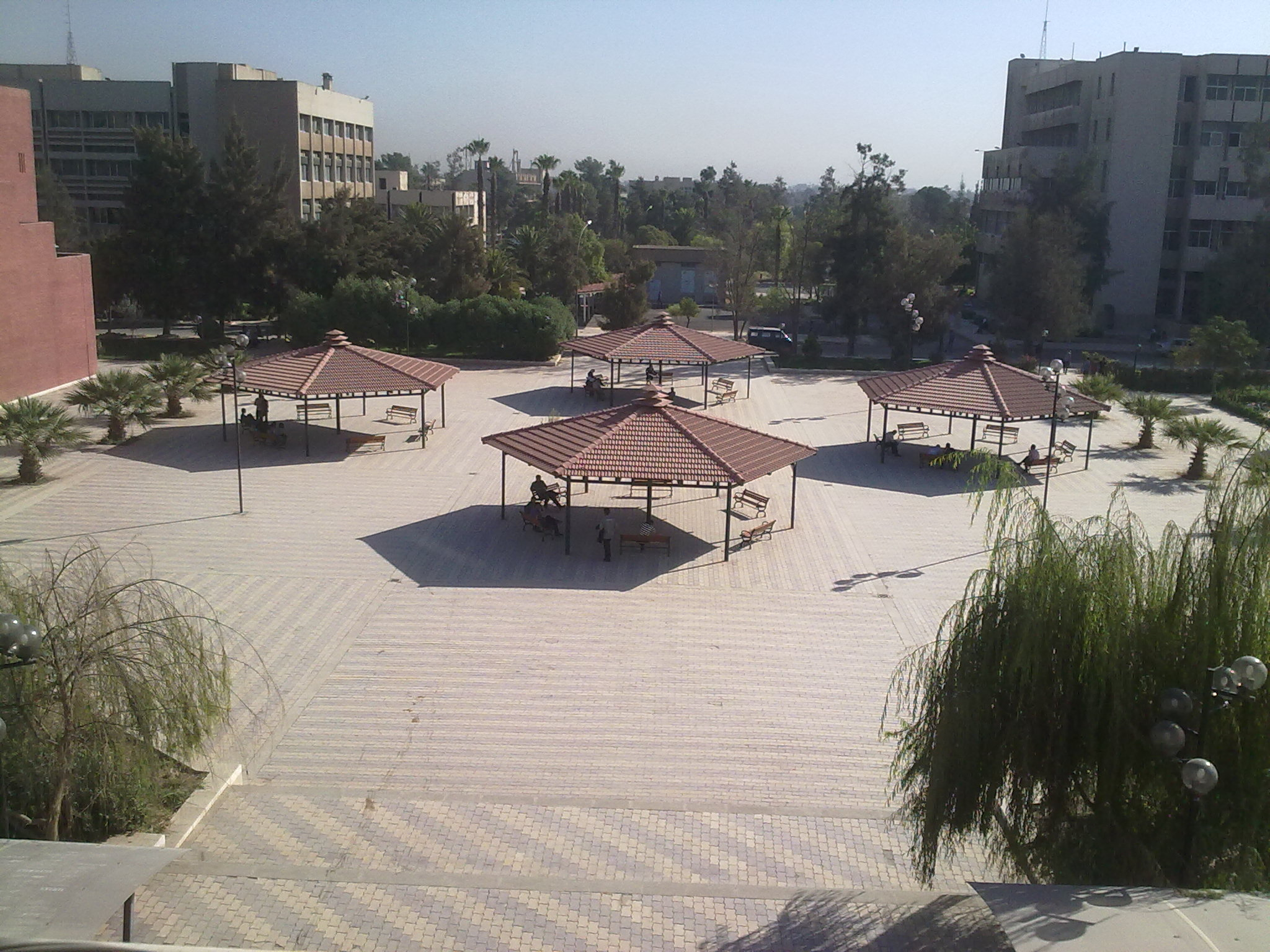 ساحة الأحمر